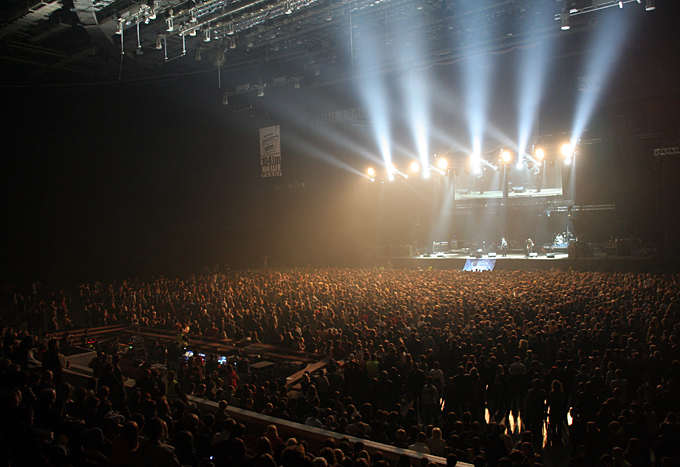 Концерт рок-группы Пилот в рамках акции Мир против наркотиков